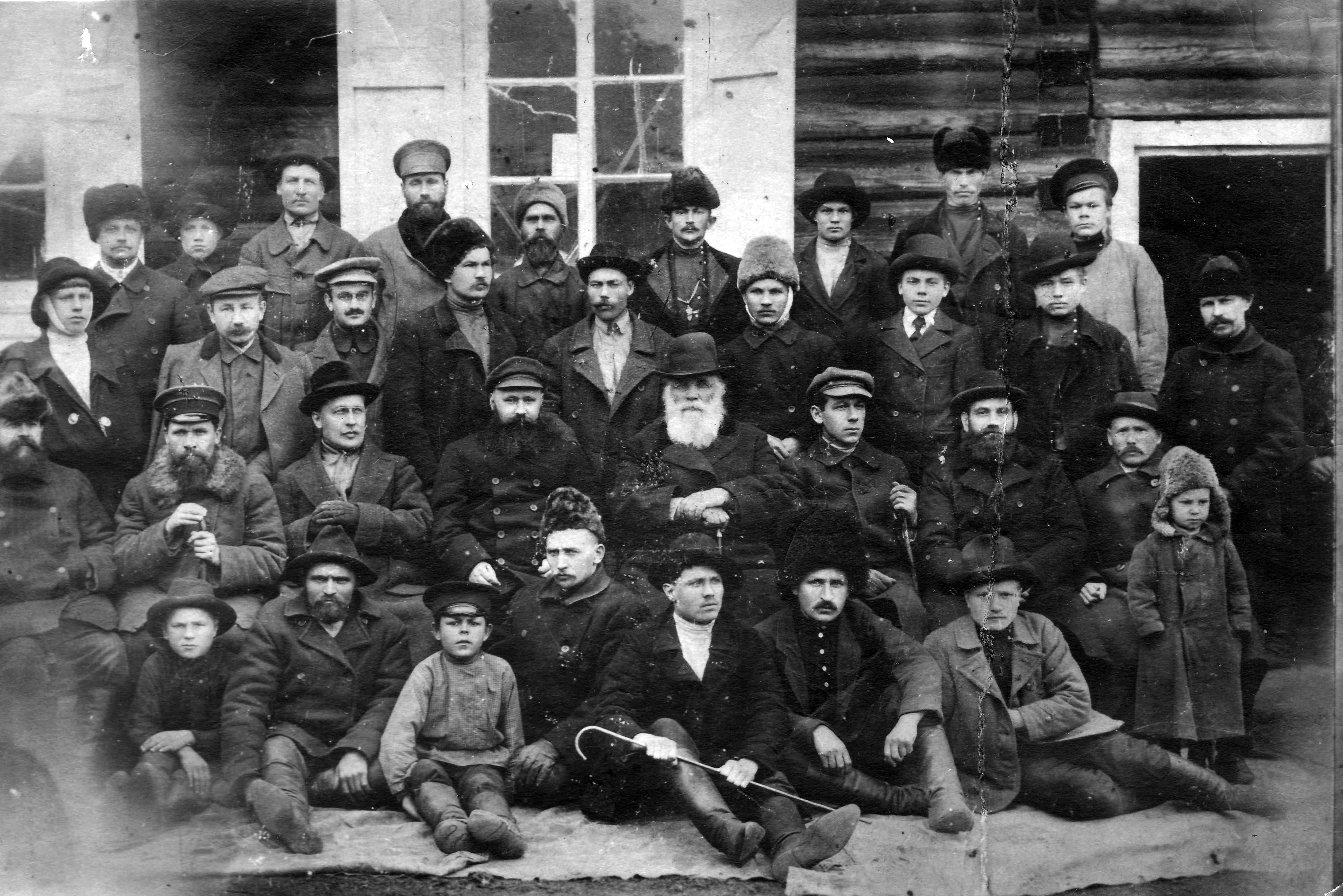 Нижнеилимск. Купец Яков Андреевич Черных (в центре)